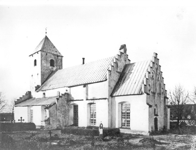 Bunkeflo gamla kyrka, byggd under medeltiden, riven 1896.